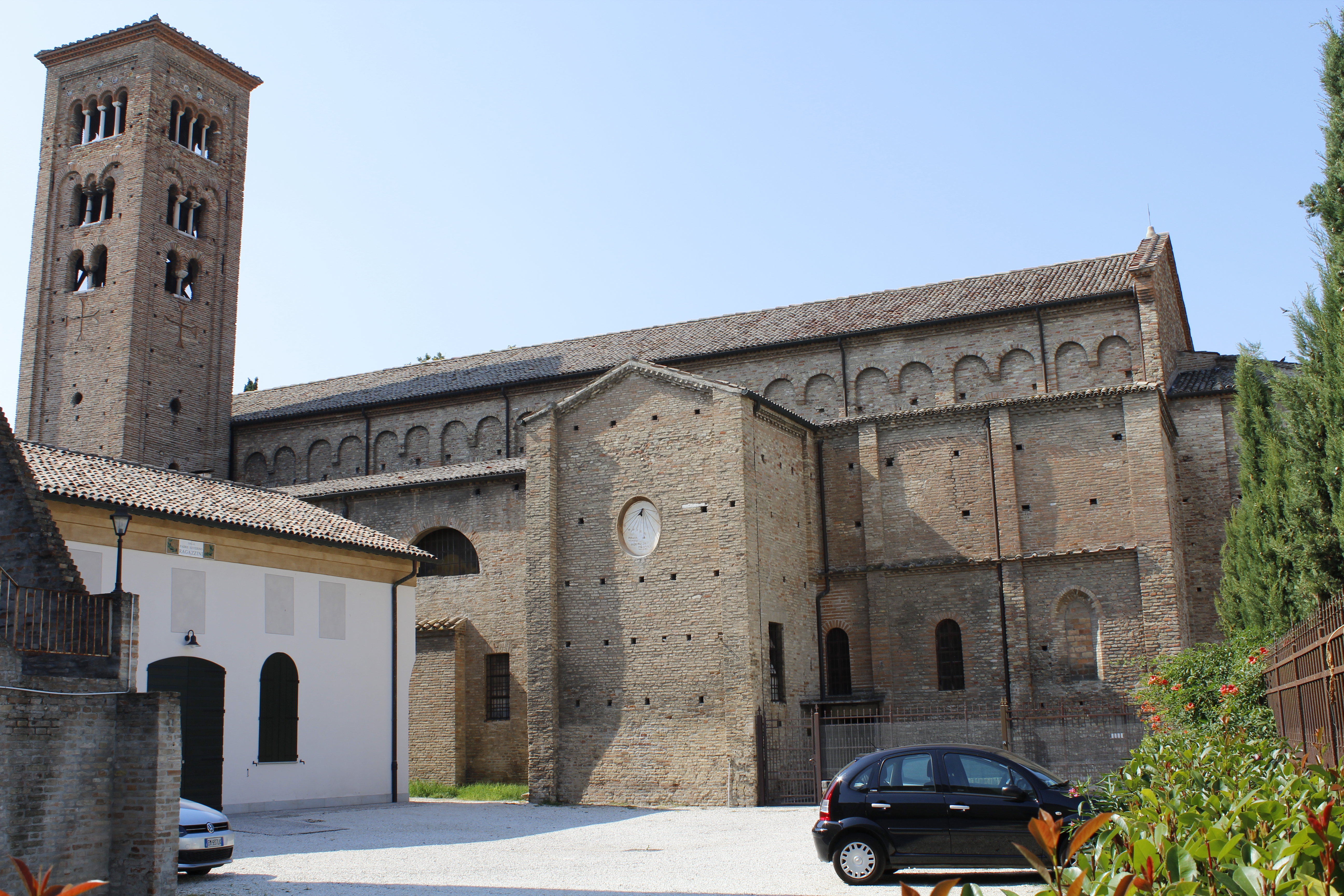 Retro di San Francesco, Ravenna